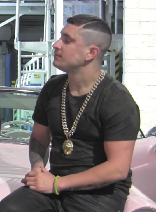 Osmani García cantante cubano entrevista